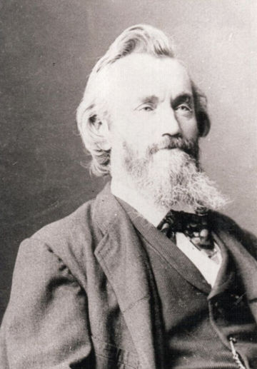 Heinrich Geuer (1841-1904)